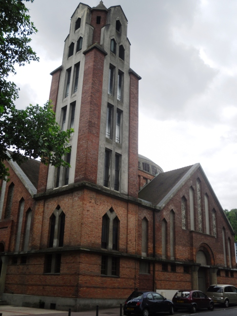 L'église Notre-Dame-de-France de Juvisy-sur-Orge (91)